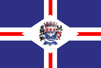 Bandeira de Lourdes - SP - Brasil.